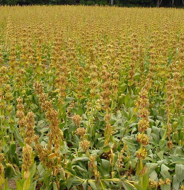 Description champ de gentianes jaune Date2002Sourcephoto de charlespierreAuthorcharlespierrePermission (Reusing this file) charlespierre champ de gentianes jaune